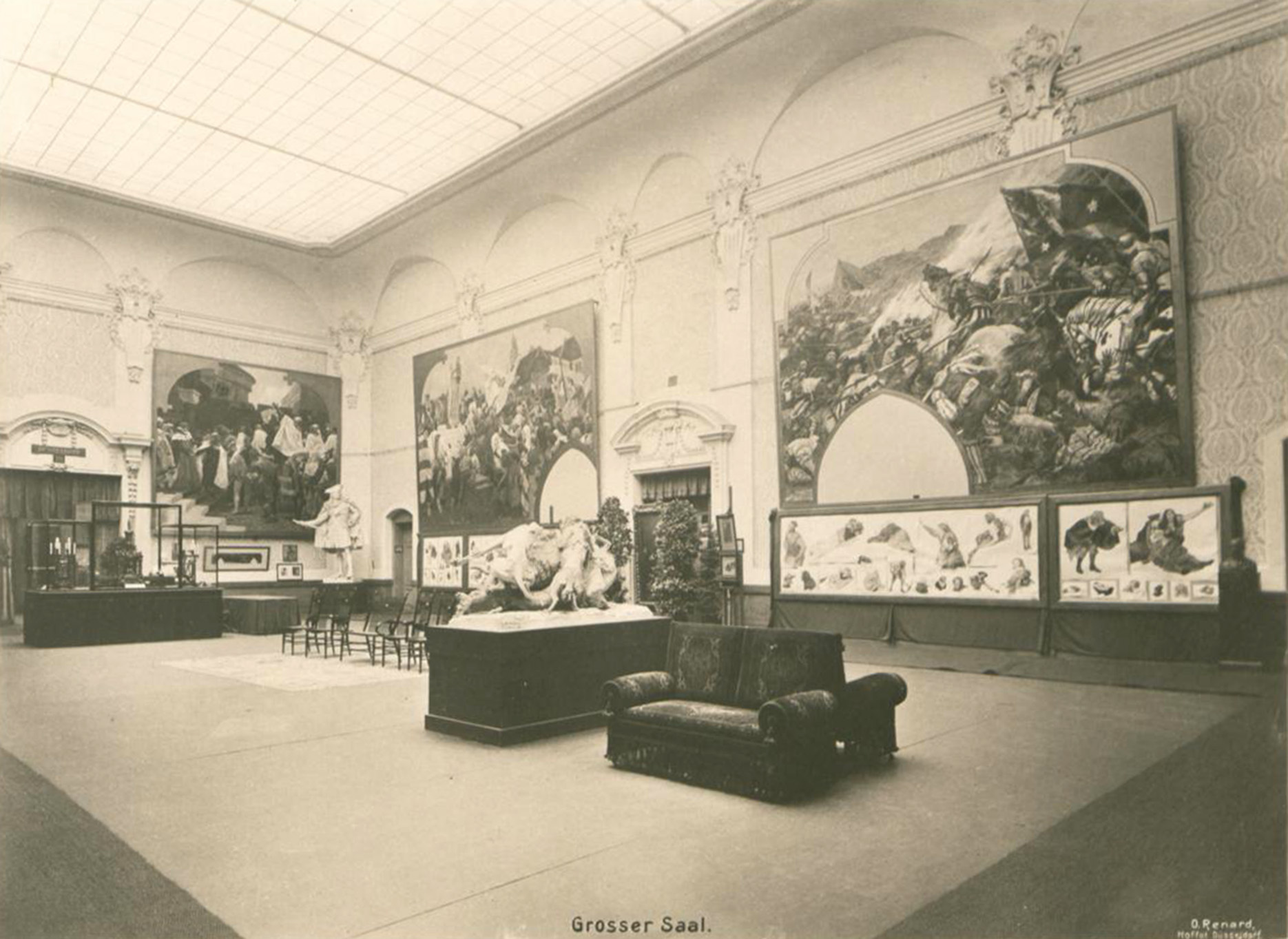 Kunstpalast, Grosser Saal, mit "Die Schlacht bei Lauffen" von Johann Peter Theodor Janssen, Foto Otto Renard, 1902